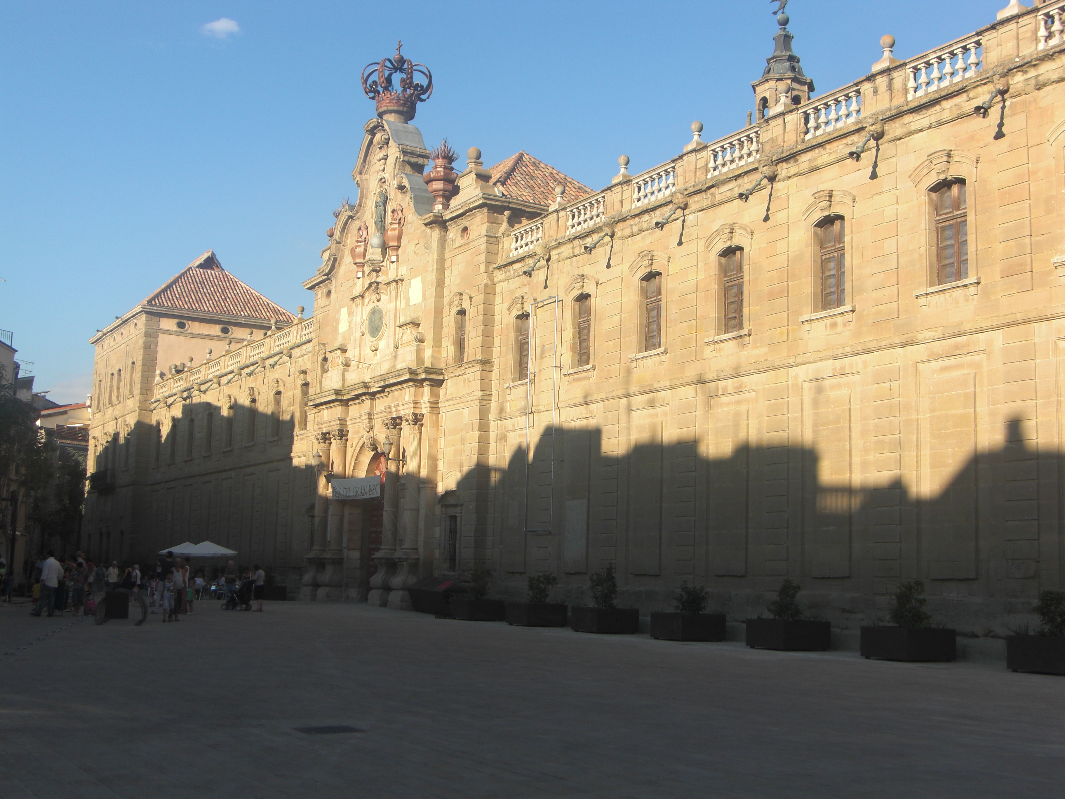 Imatge de la seva façana